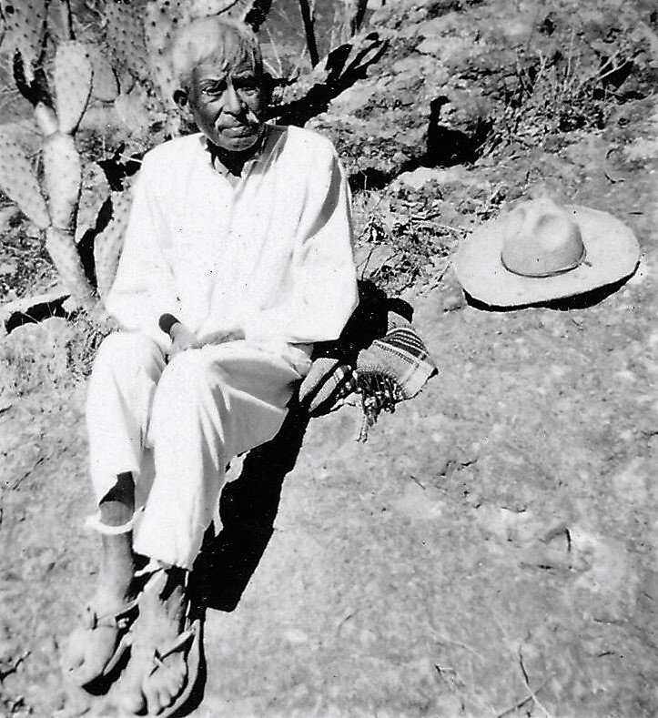 Campesino, don Teodoro Trujillo, San Juan Achiutla, Oaxaca, México, 1945